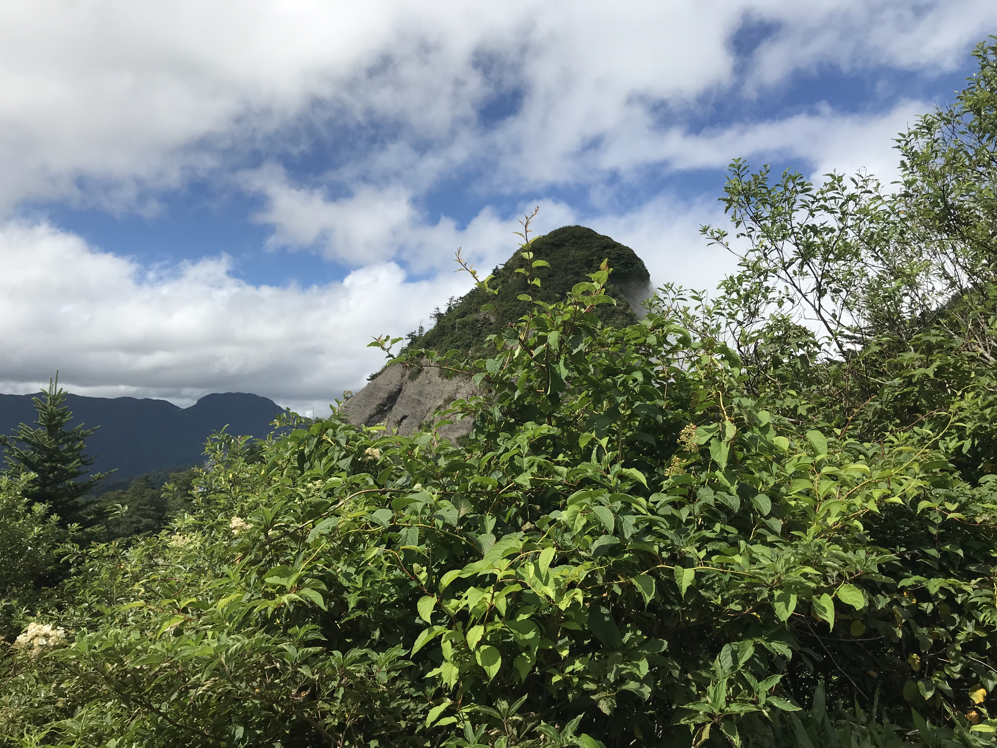 UFOラインからみた子持権現山。愛媛県と高知県の県境に位置する。